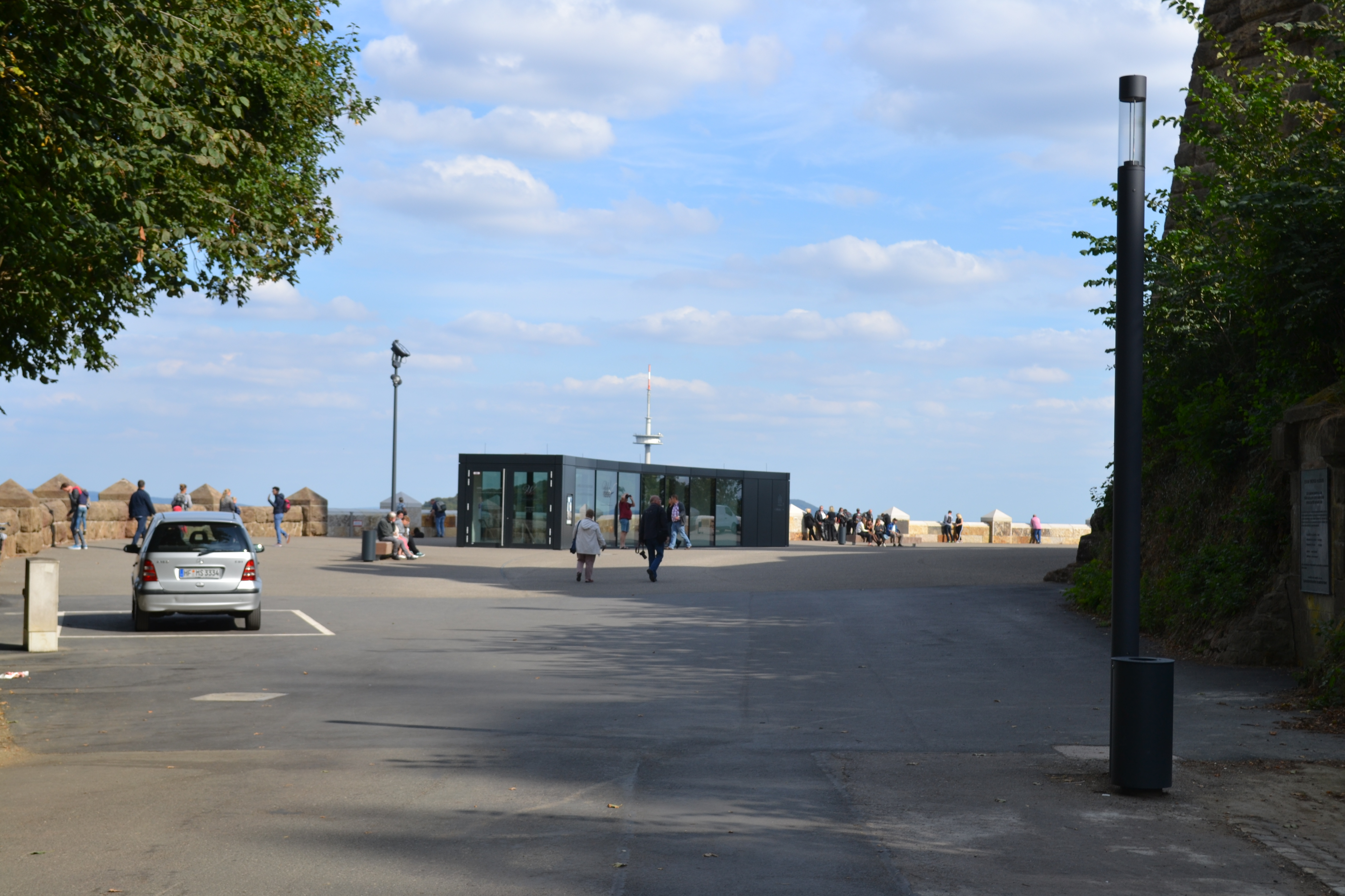 Blick a uf die widerhergestellte Ringterrasse des Porta Denkmals